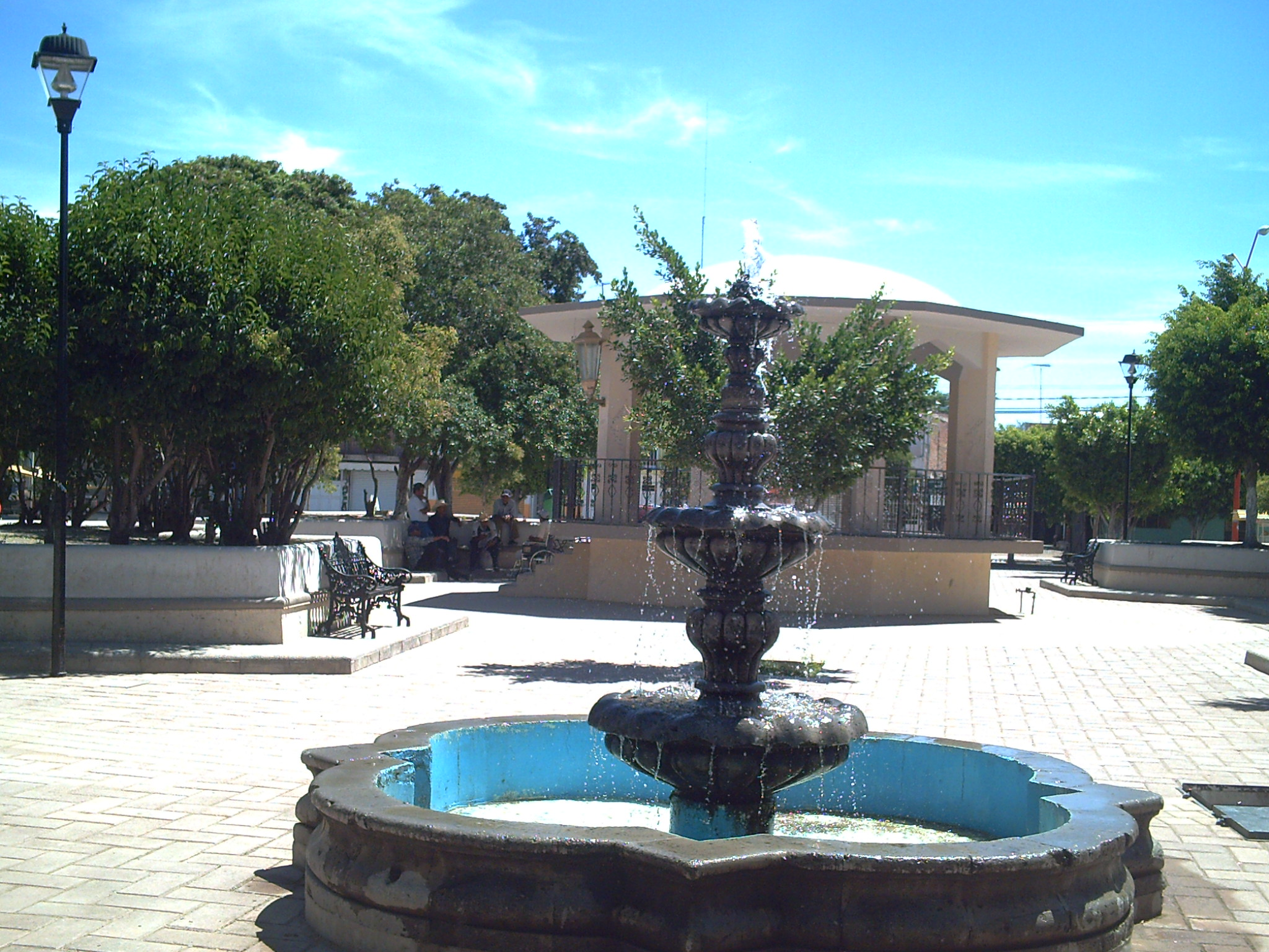 Plaza del Barrio de San Miguel frente al templo que lleva el mismo nombre